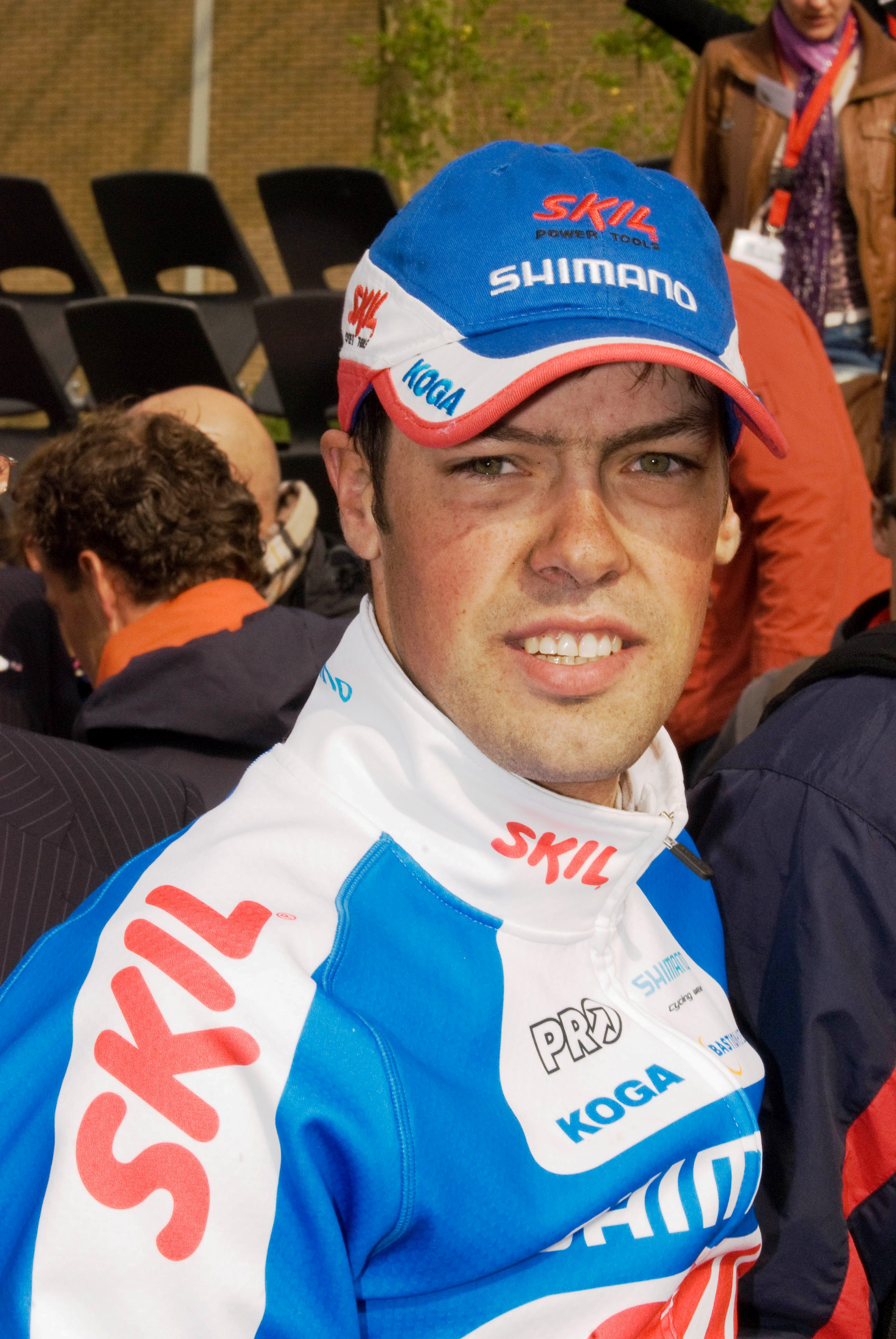 Job Vissers (15 november 1984) is een Nederlands wielrenner momenteel uitkomend voor Skil-Shimano. Vissers werd in 2010 professional. Foto gemaakt tijdens de Ronde van Overijssel